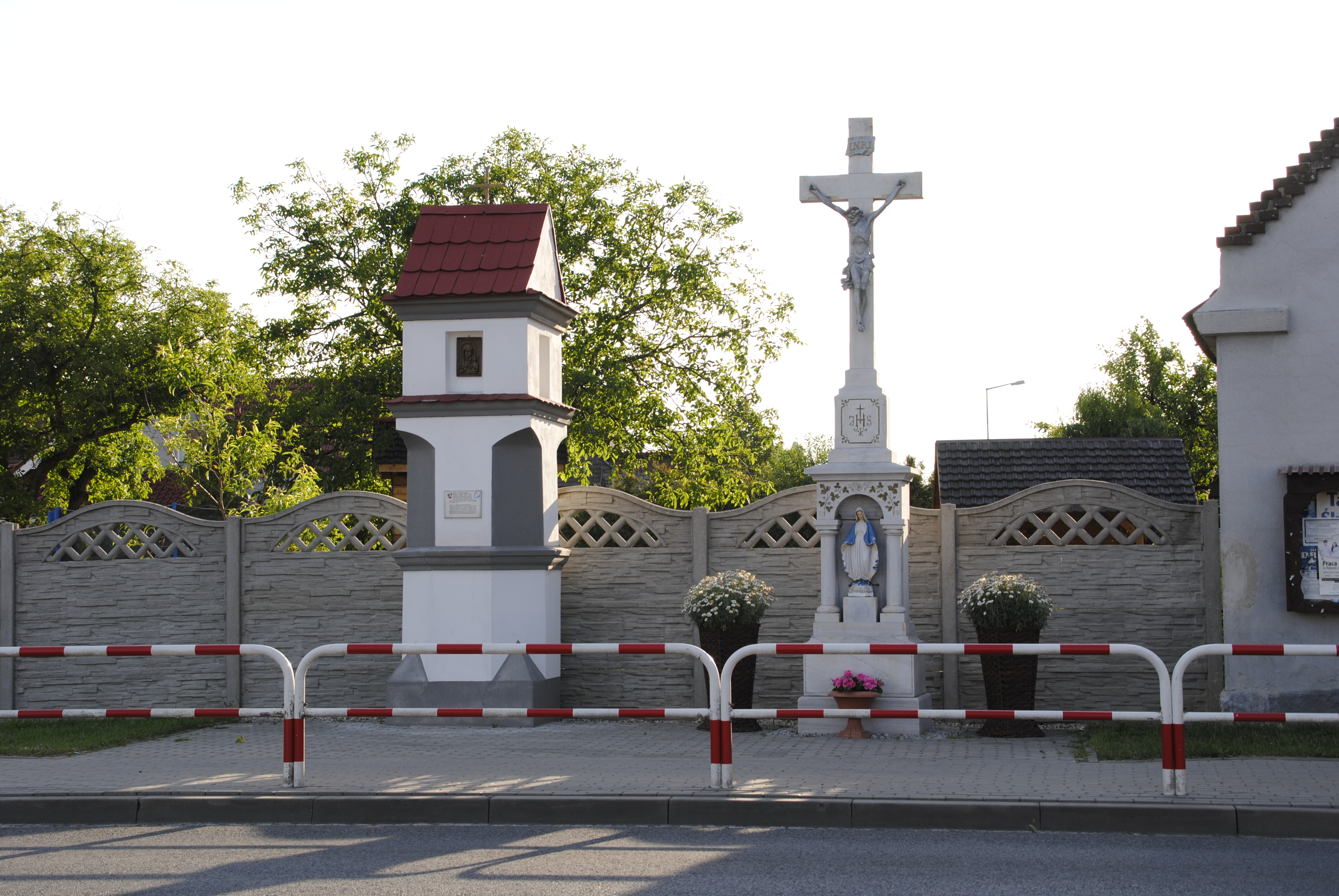 Straßenkapelle und Straßenkreuz an der DK45 in Zlönitz